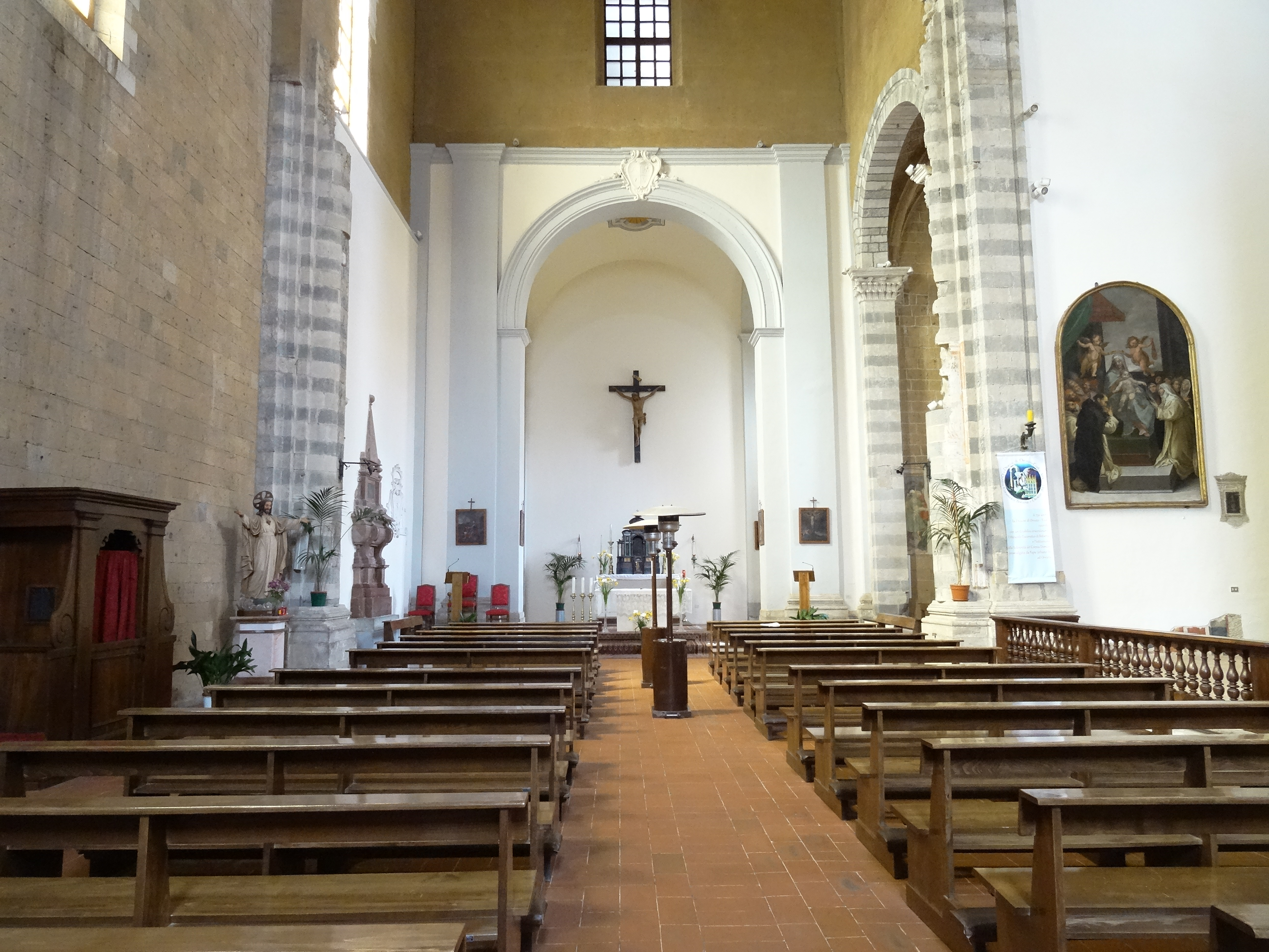 Orvieto